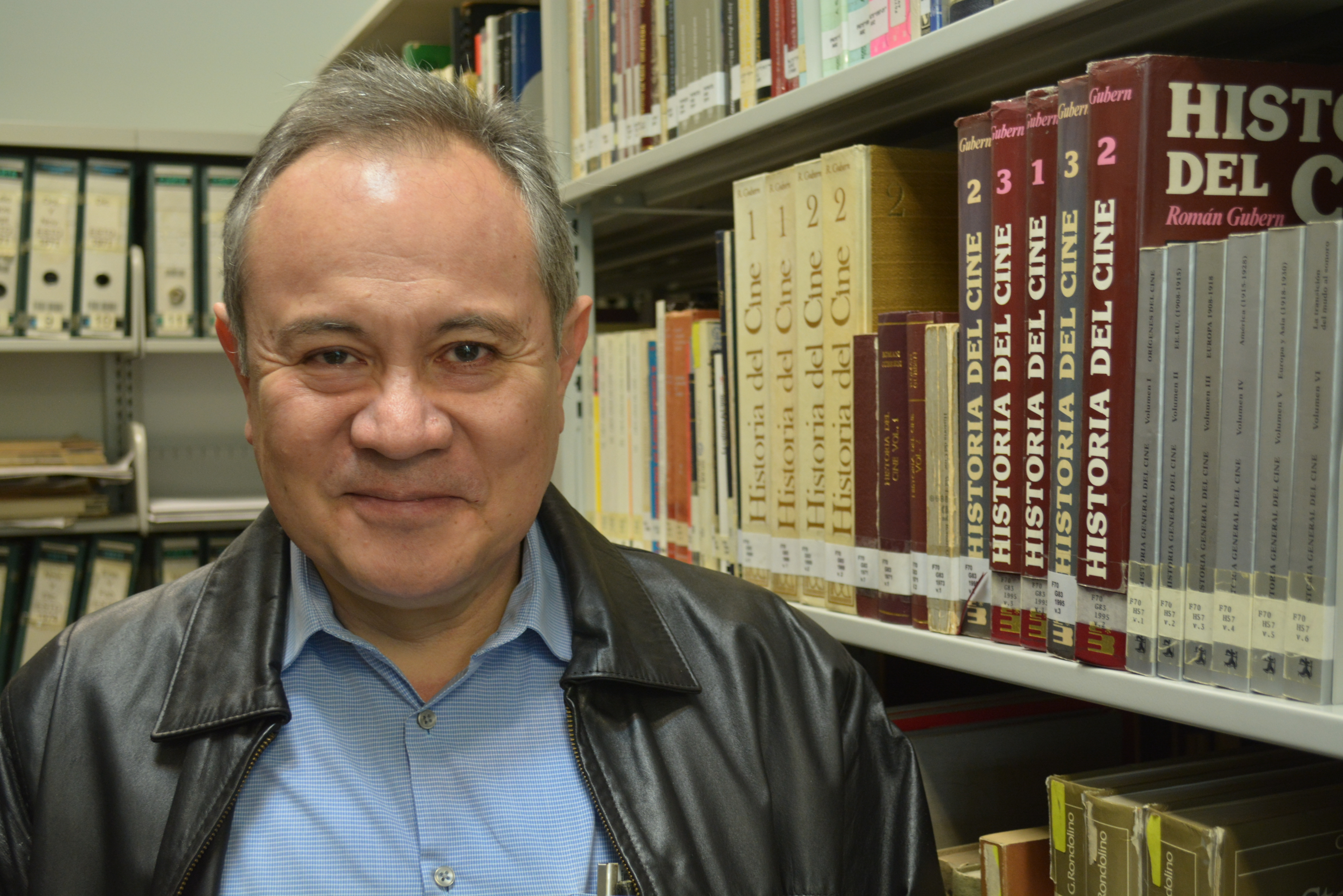 El crítico de cine mexicano Leonardo García Tsao en el Centro de Documentación e Investigación de la Cineteca Nacional durante el Segundo Editatón Wikipedia ama el cine.